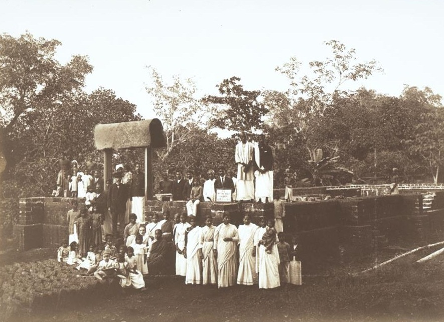 മലബാറിലെ ക്രിസ്ത്യാനികൾ പള്ളി പണിയുന്നു. (1900-നു മുൻപുള്ള കാലം)